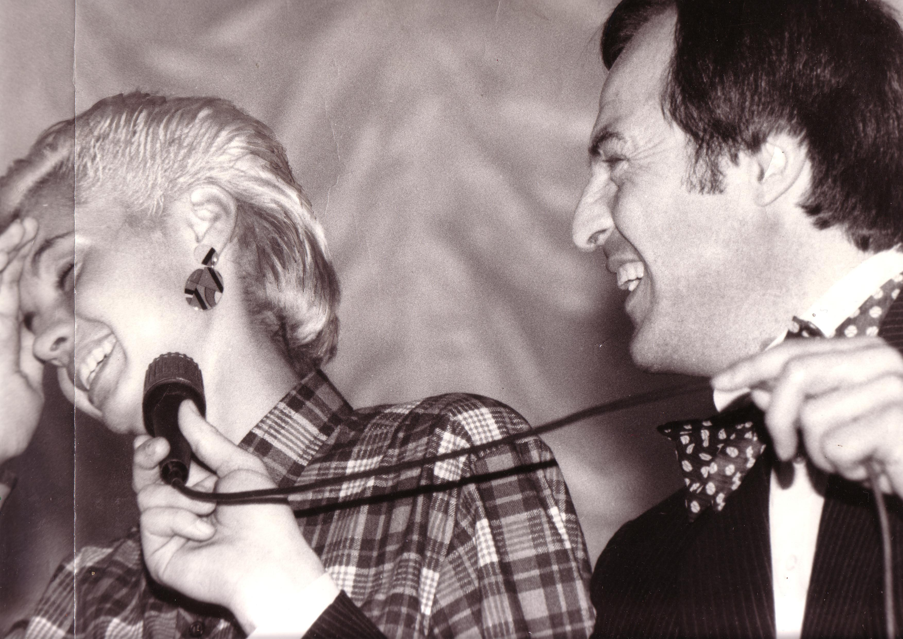 Сцена из театра гипноза, на концерте в МАИ